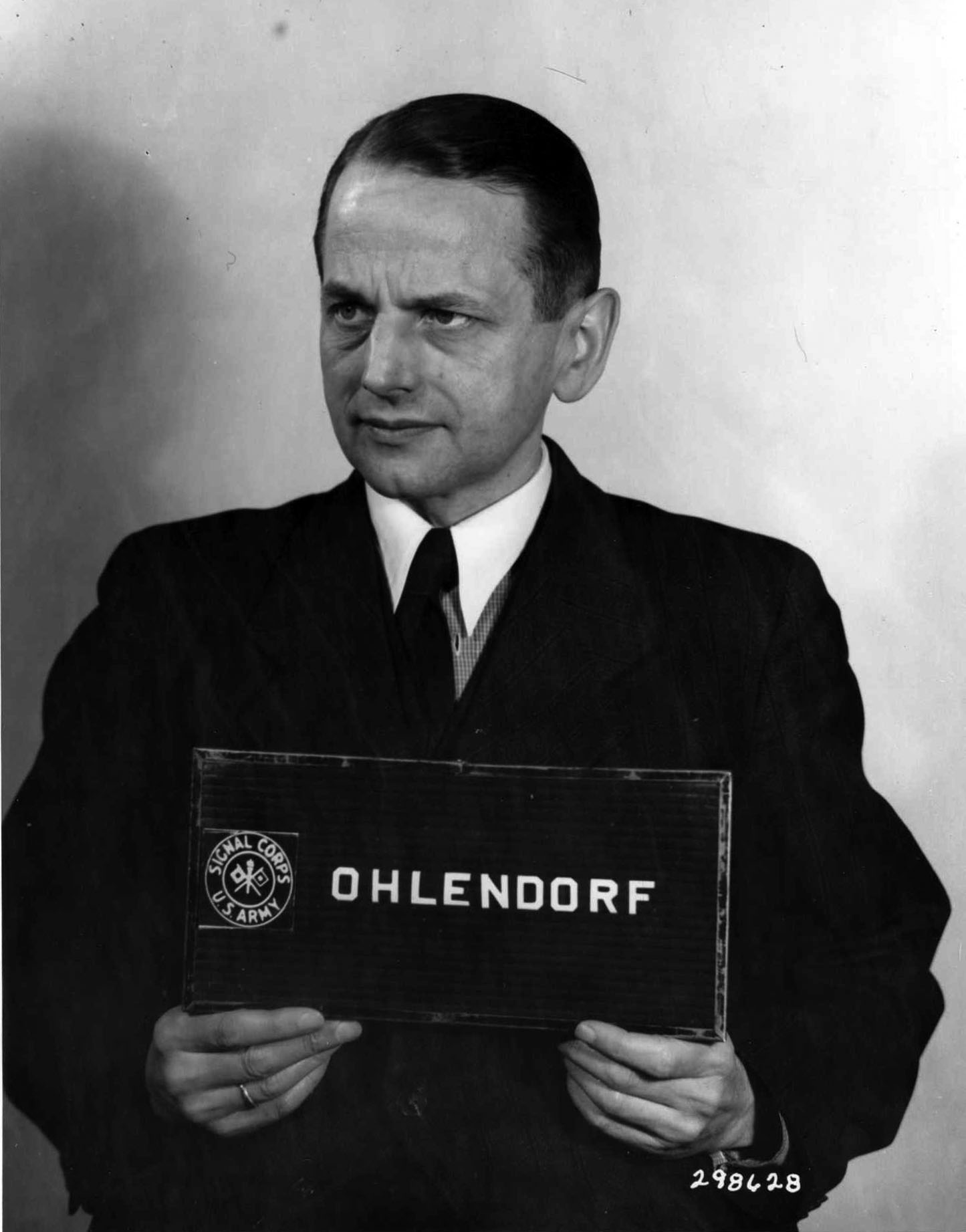 Otto Ohlendorf, former commander of 'Einsatzgruppe B'